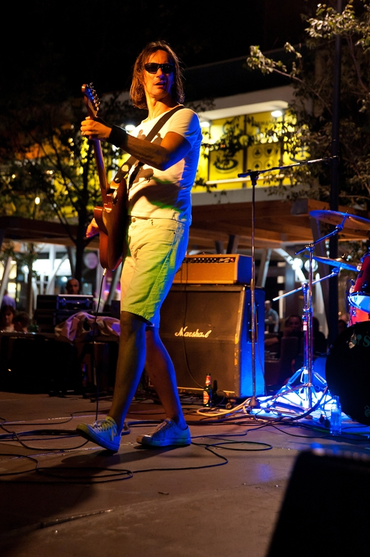 Davor Gobac i Psihomodo pop